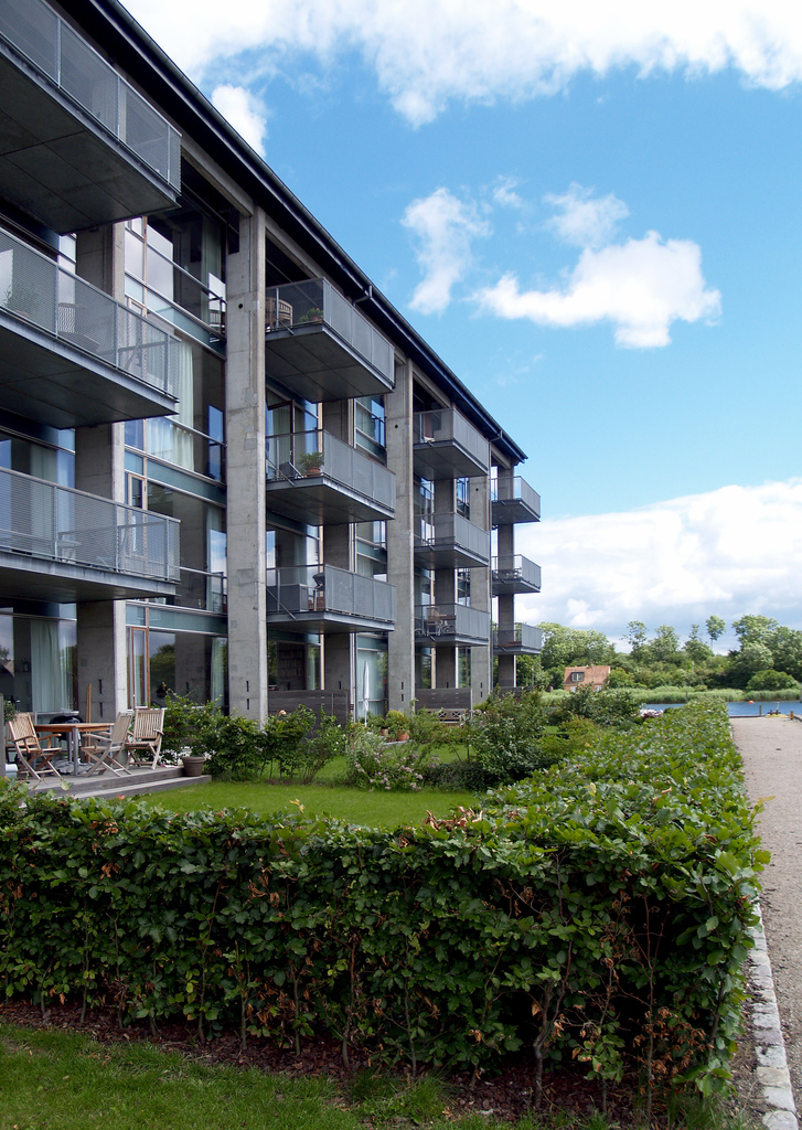 Torpedohallen, Holmen, København. Bygget 2000-2002. Første projekt hos Tegnestuen Vandkunsten.